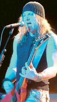 Kai Hansen in Japan